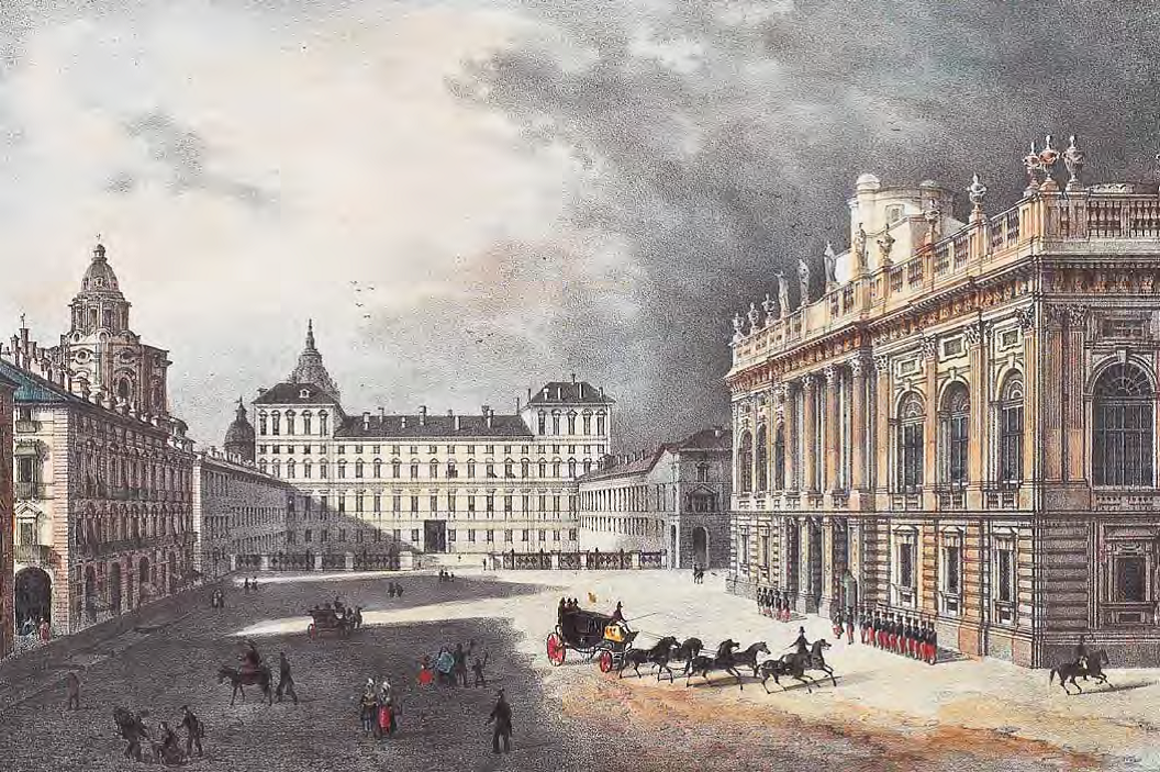 passaggio della carrozza Reale del re Carlo Alberto in Piazza Castello a Torino